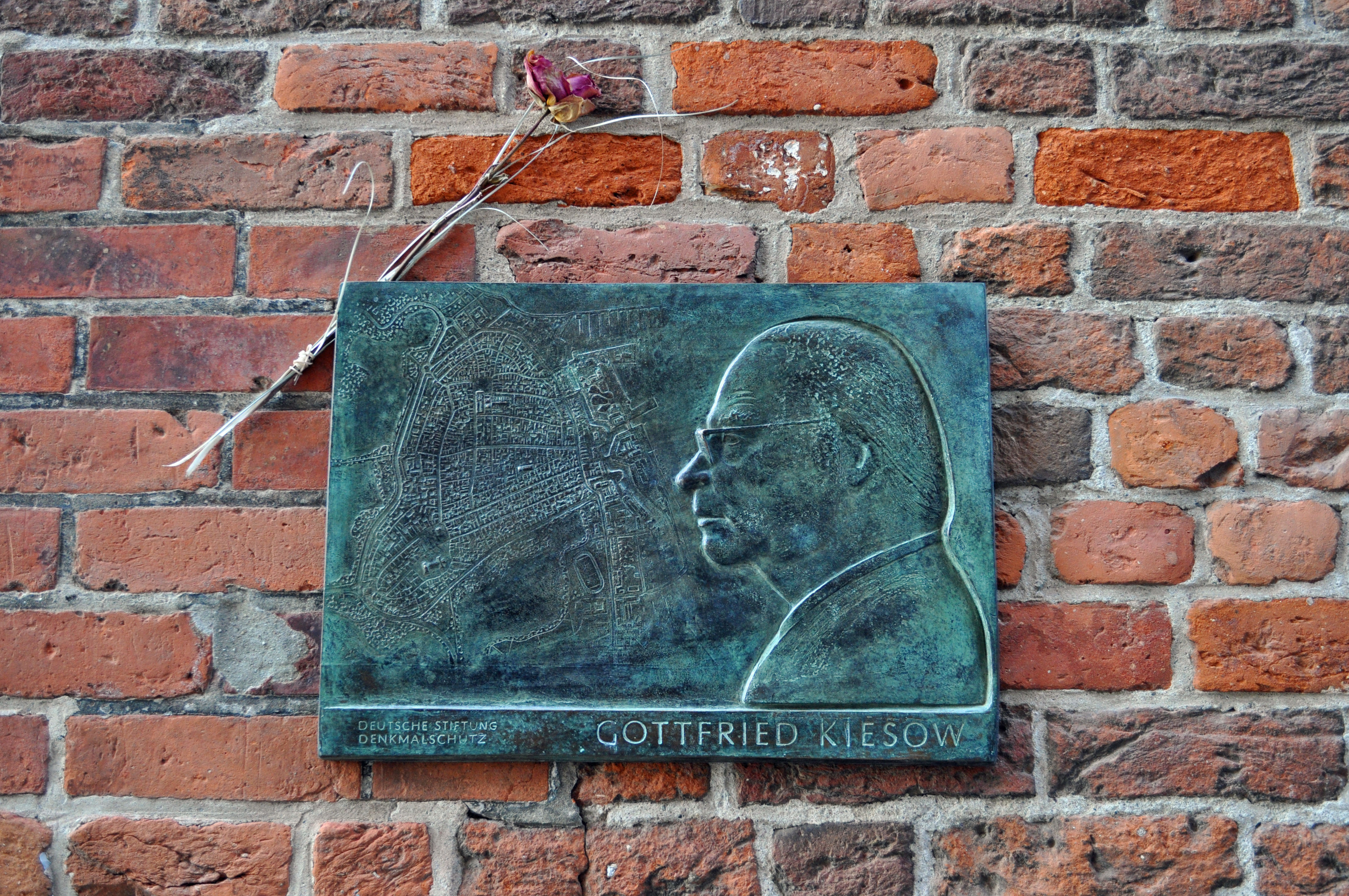 Gebäude bzw. Gebäudedetail in Stralsund. Straße und Hausnummer siehe Dateiname.